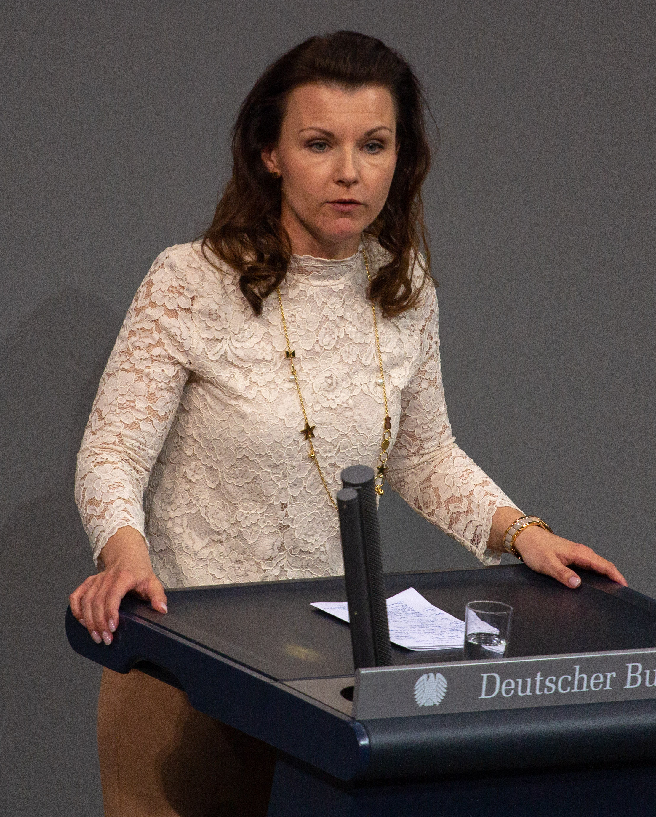 Jana Schimke, Mitglied des Deutschen Bundestages, während einer Plenarsitzung am 11. April 2019 in Berlin.